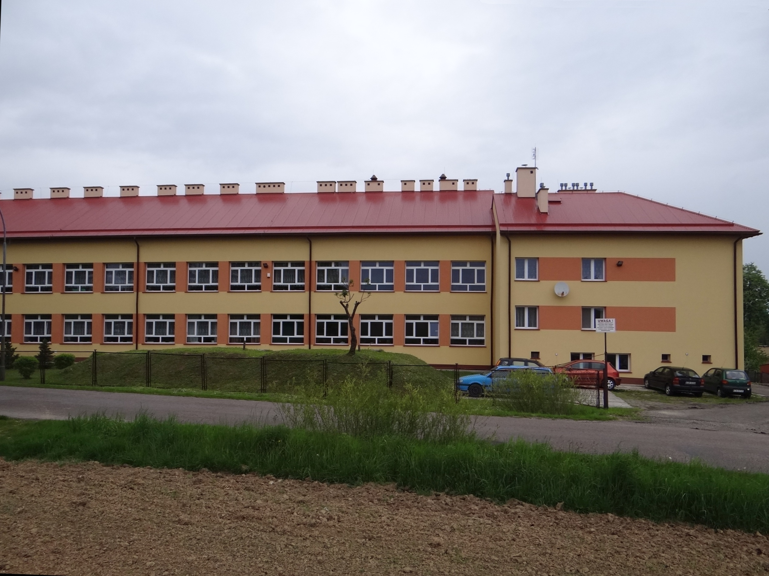 Turza, budynek szkoły